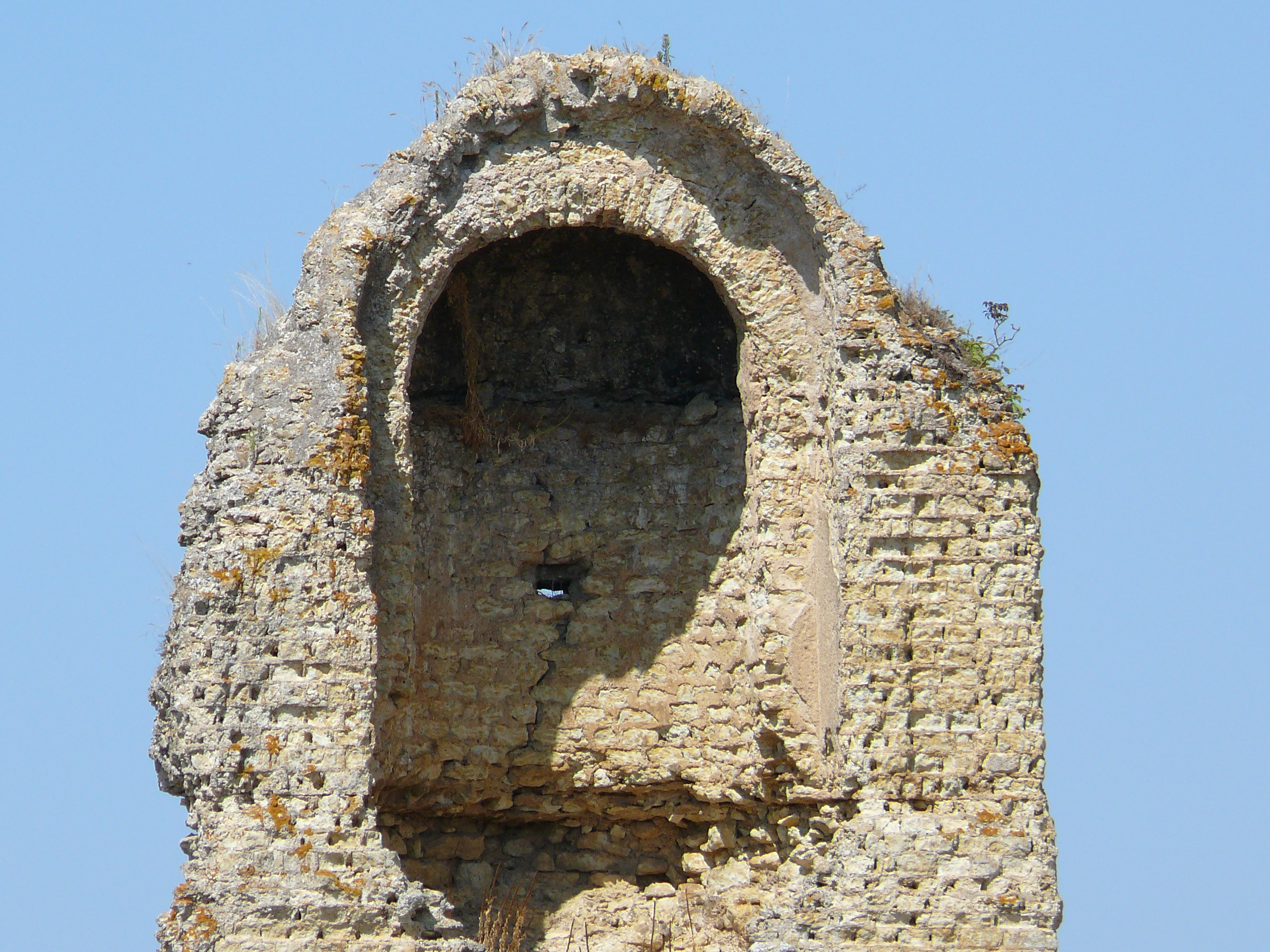 Tour gallo-romaine de Biran, Gers ; détail .